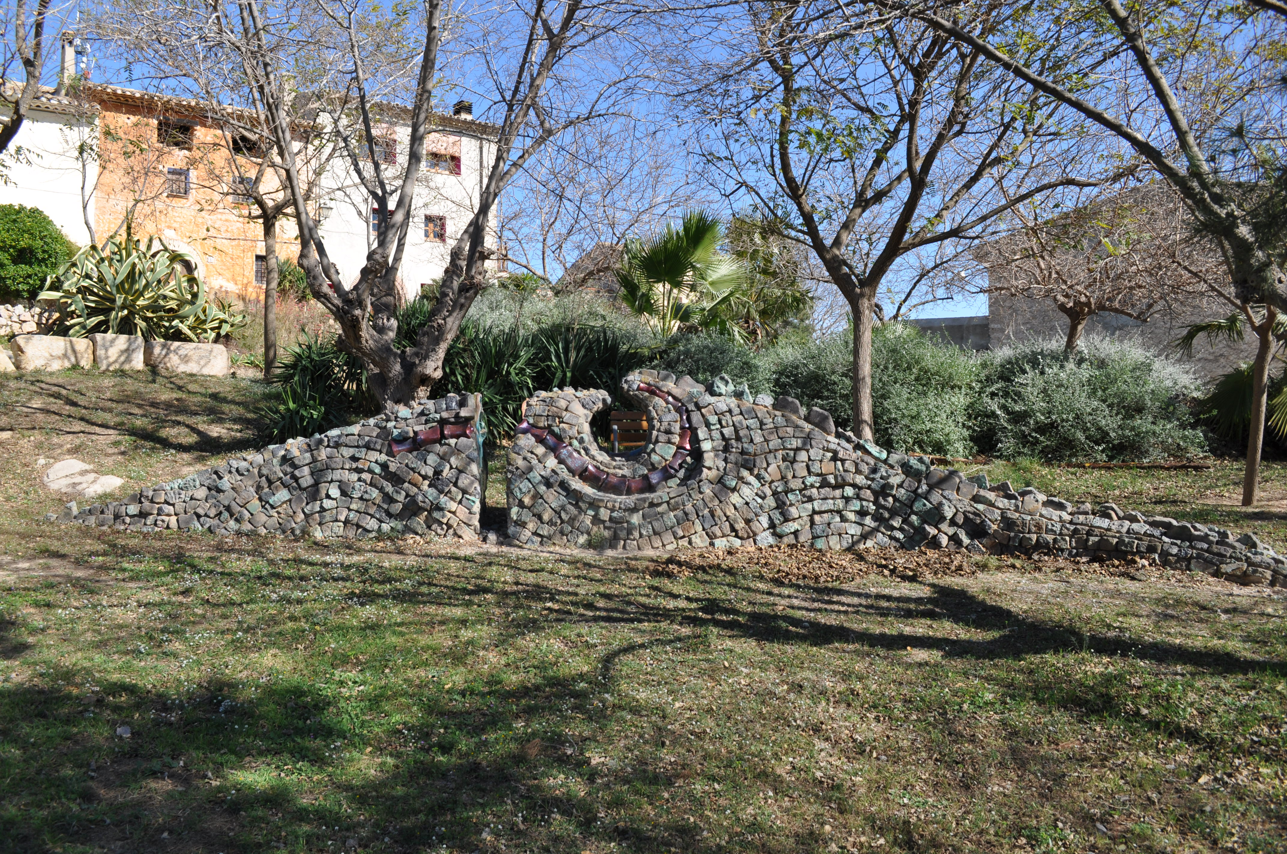 Marti Royo - Drac - Pl. Pujol - Vespella de Gaià